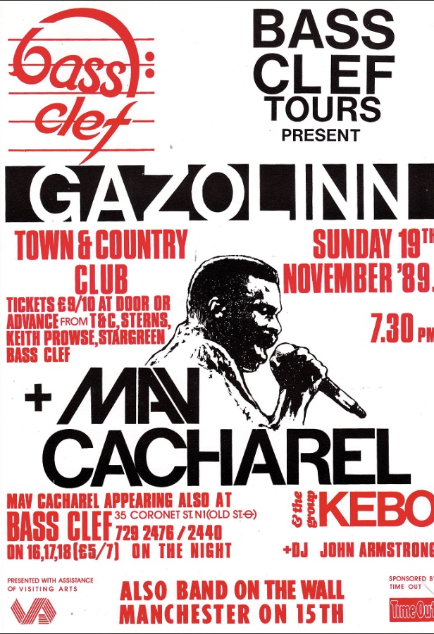 Mav Cacharel et son groupe Kebo en concert à Manchester